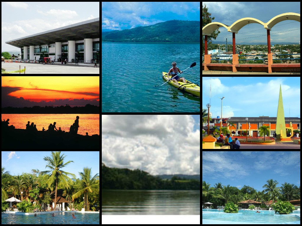 Imágenes de la ciudad de Tarapoto